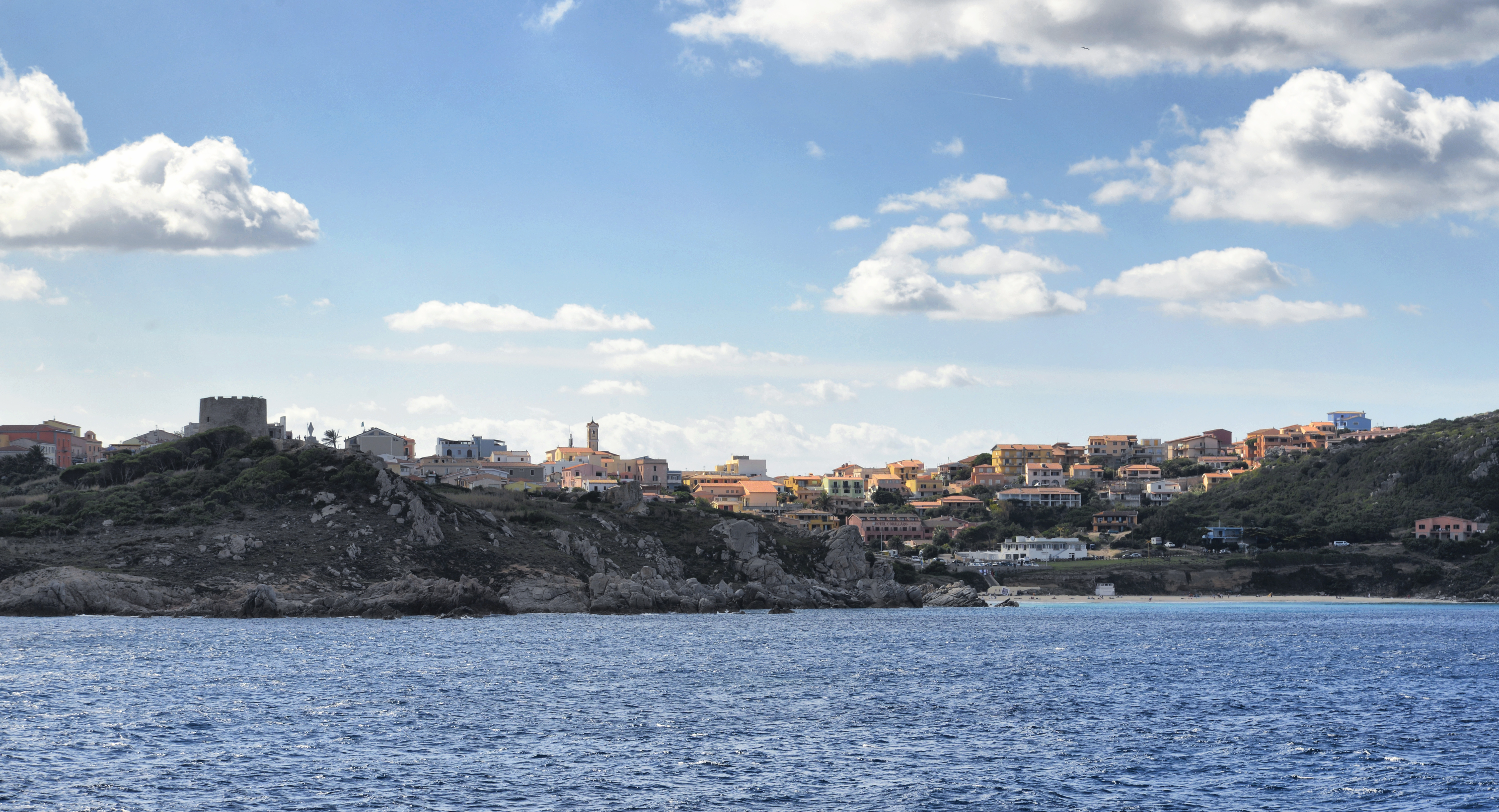 Santa Teresa Gallura, Sardaigne (Italie) - Vue de la ville dominée par le clocher de l'église paroissiale San Vittorio, avec la torre di Longosardo à gauche, la plage de Rena Bianca à droite.